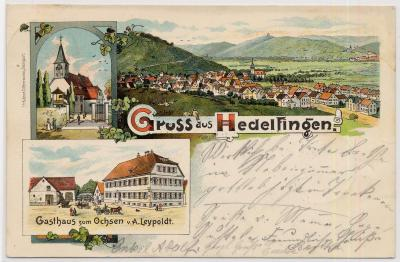 Ansichtskarte von Hedelfingen